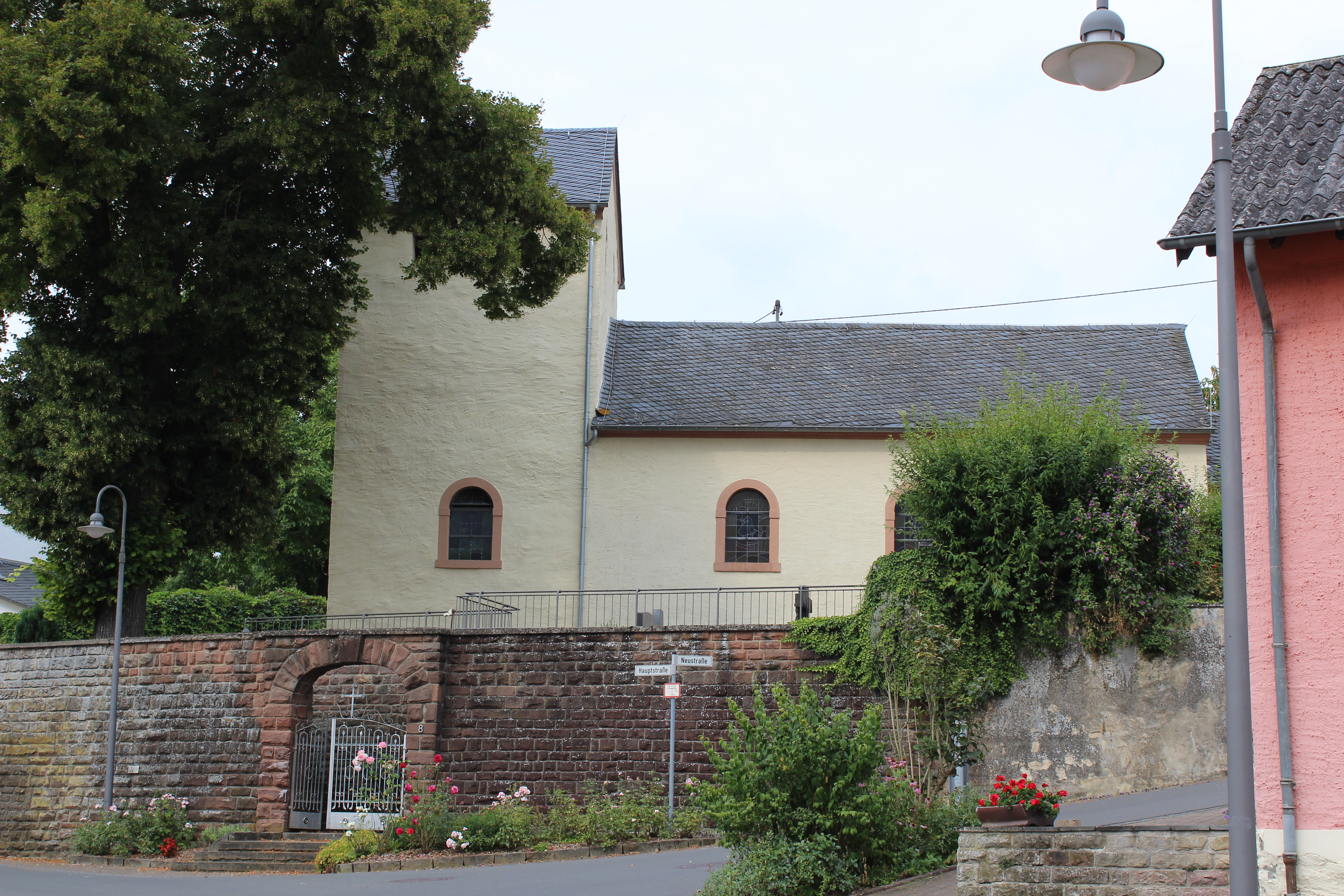 St. Agatha in Menningen ist eine römisch-katholische Filialkirche in Menningen an der Prüm.